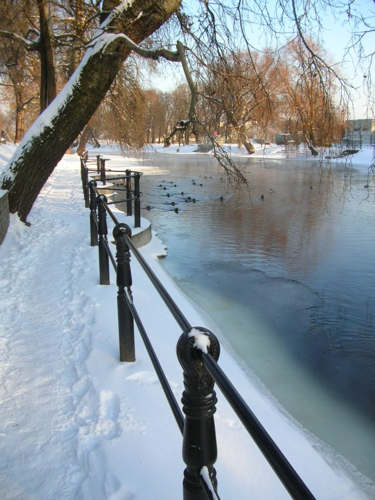 Zimą przy Młynówce